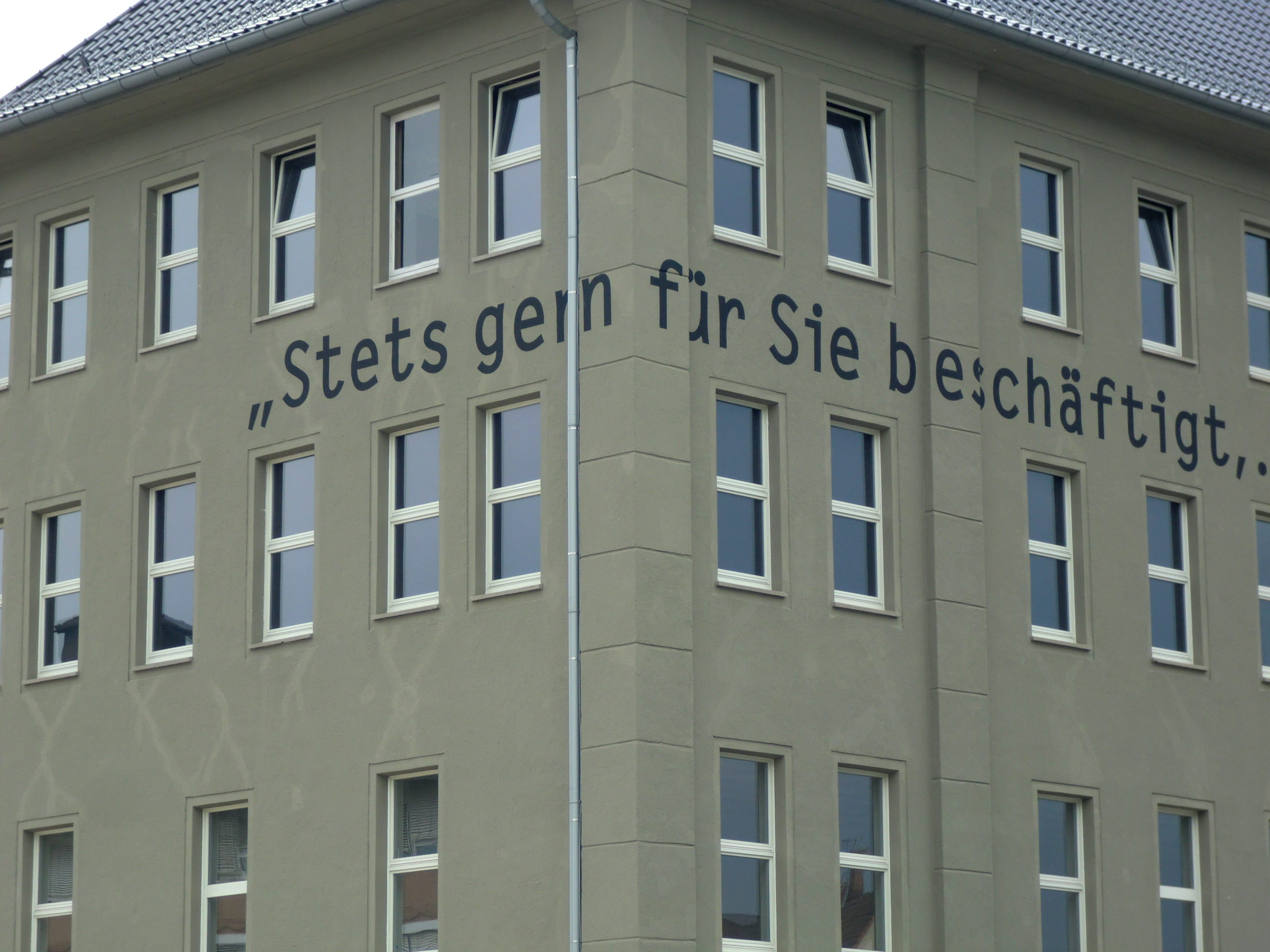 Gedenkstädte J. A. Topf & Söhne in Erfurt mit Spruch "Stets gern für Sie beschäftigt, ..."